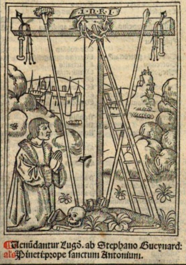 Marque typographique d'Etienne Gueynard. Lyon 1513